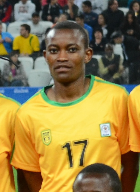 São Paulo - Seleções femininas do Zimbábue e da Alemanha se enfrentam na Arena Corinthians (Rovena Rosa/Agência Brasil)